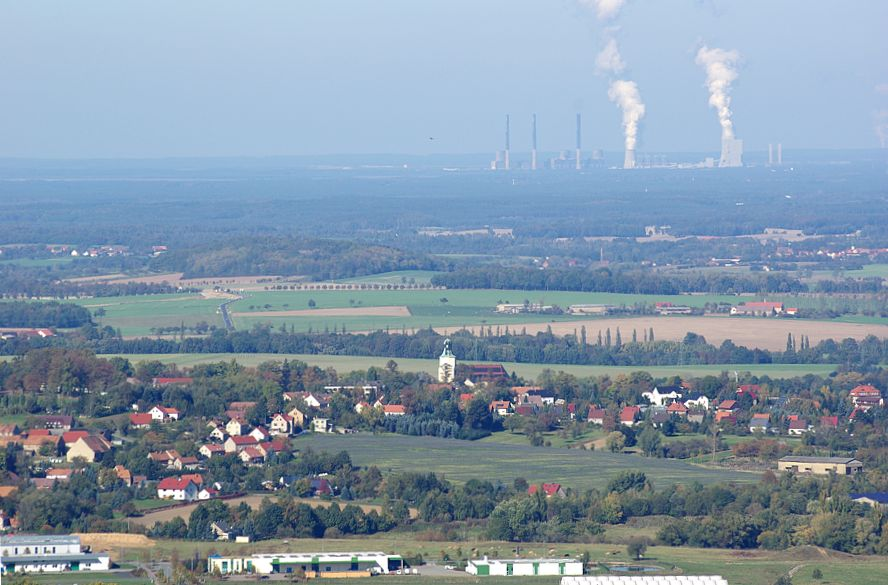 Blick vom König-Friedrich-August-Turm über Kittlitz zum Großkraftwerk Boxberg Date: 2007-10-10 Author: Peter Emrich